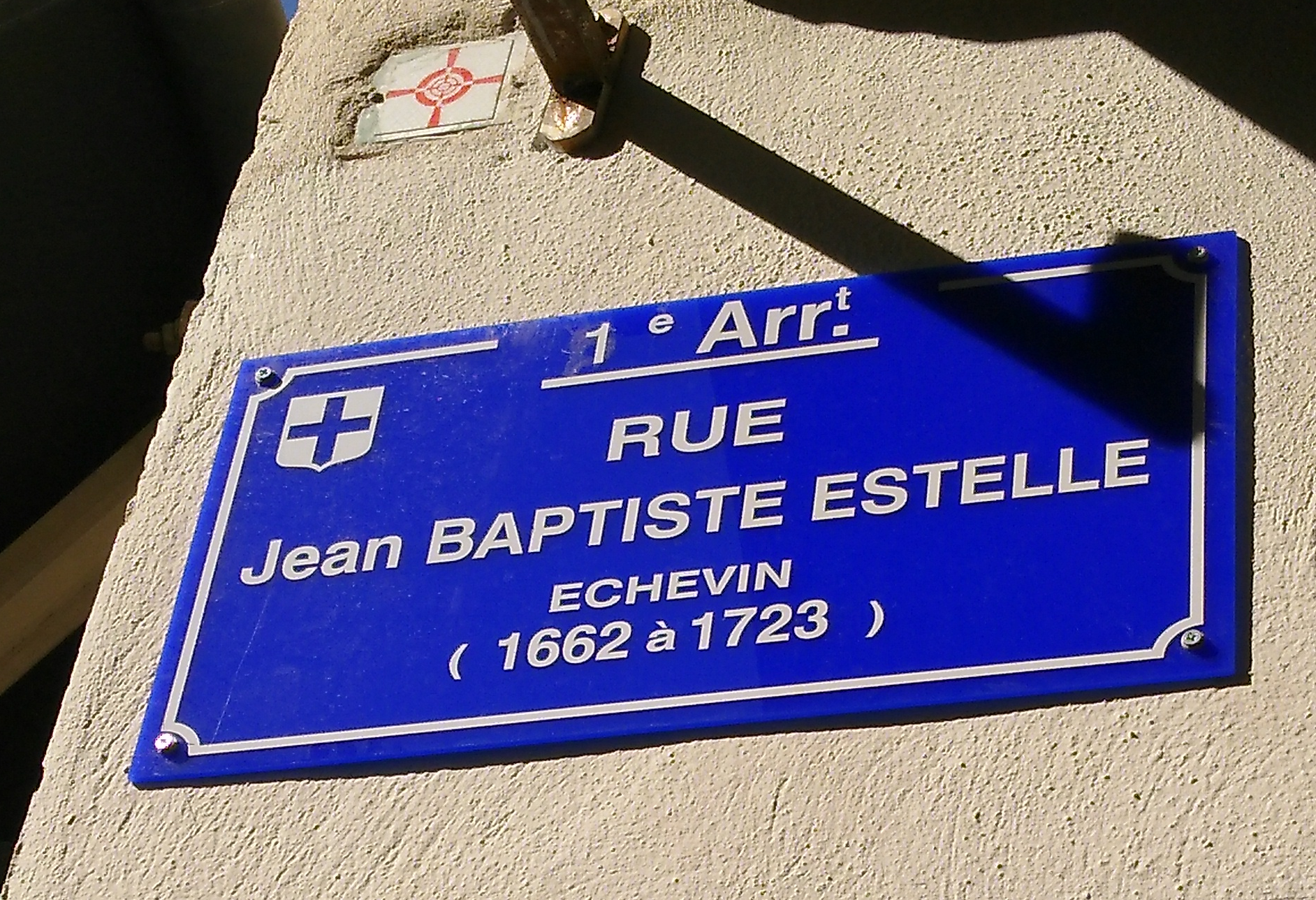 Plaque de la rue Jean-Baptiste-Estelle, échevin (1682-1723)